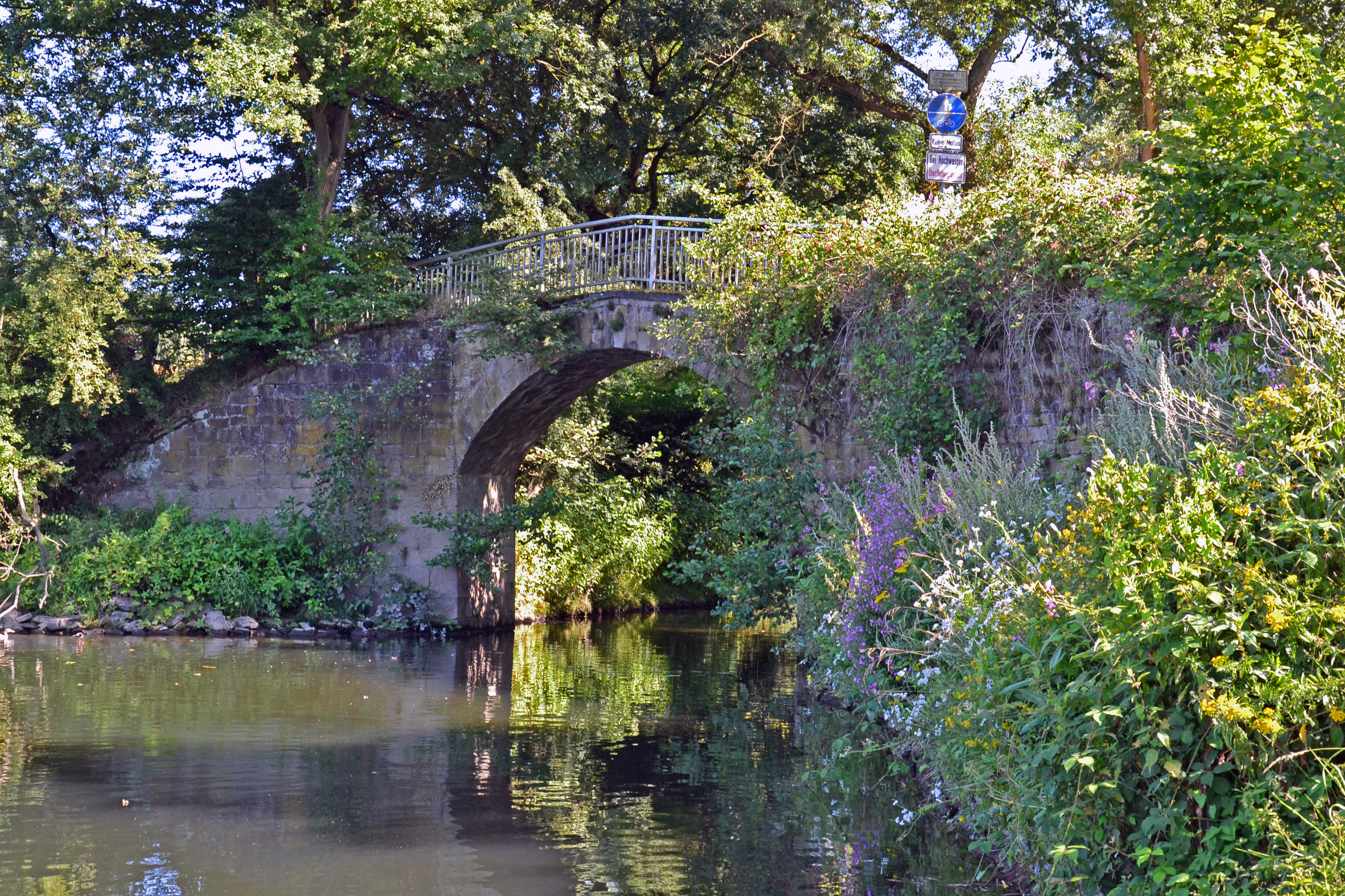 Brücke am Hafen Holtey an der Ruhr in Essen